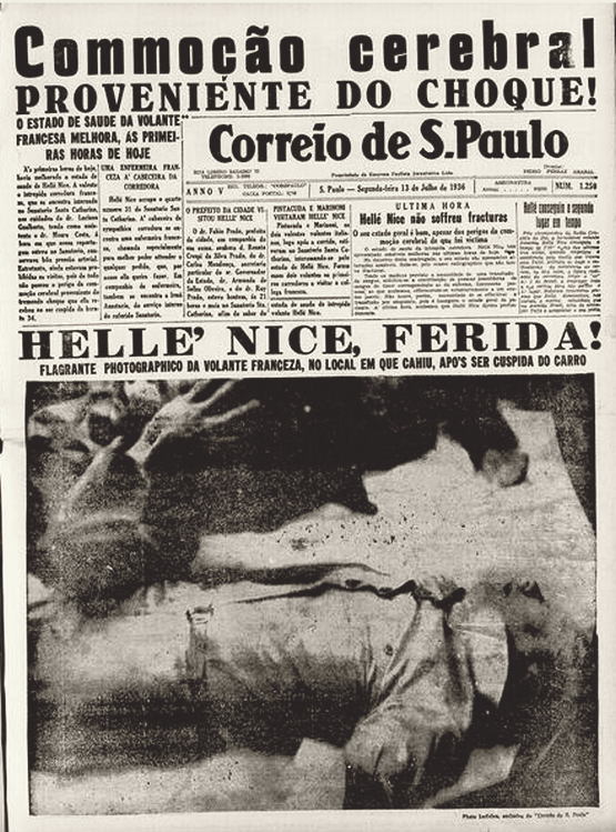 Primeira página do jornal "Correio de São Paulo" de 13 de julho 1936, noticiando o acidente de Hellé Nice.